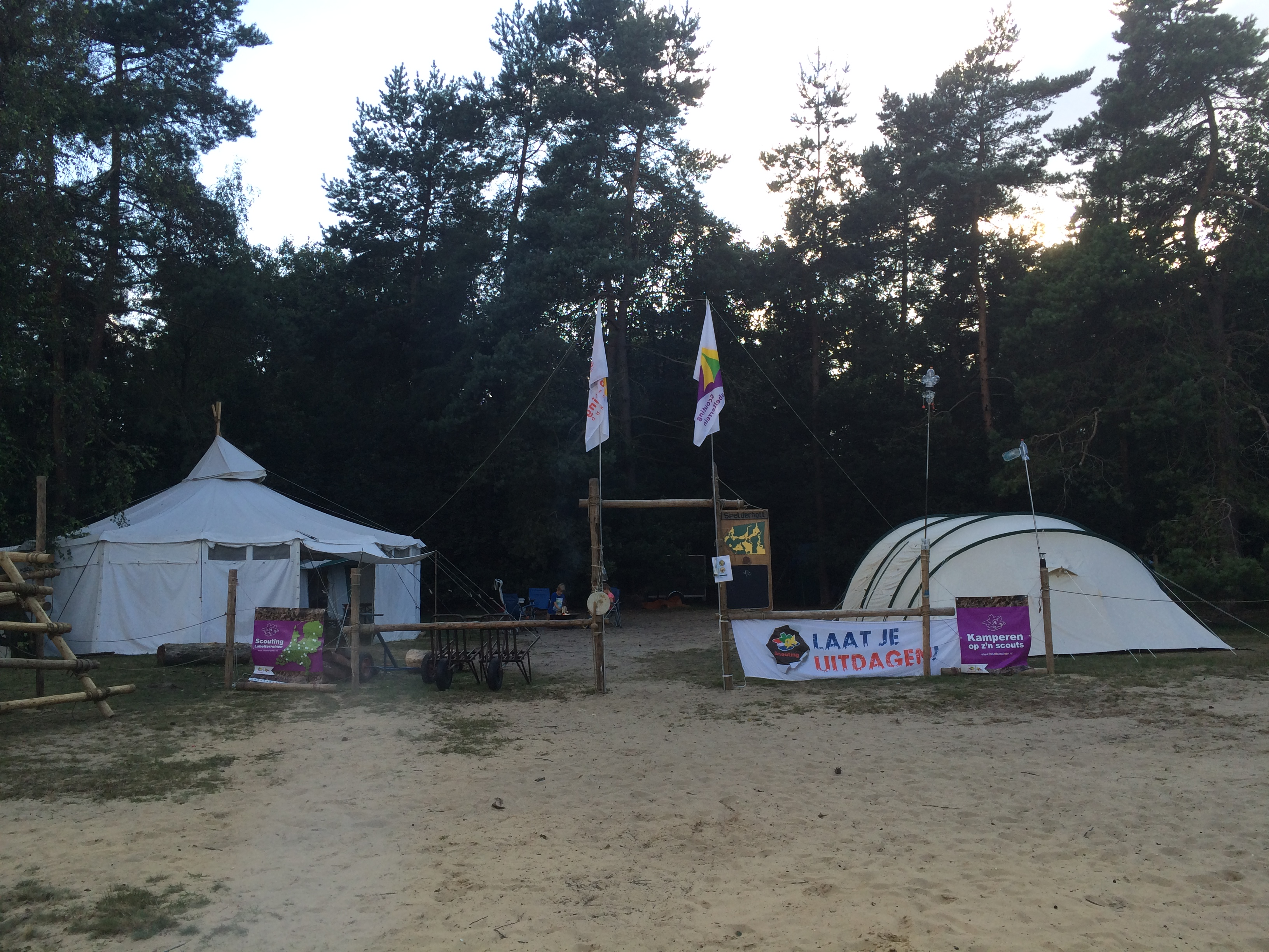 Kampstaf Kampeerterrein Spelderholt